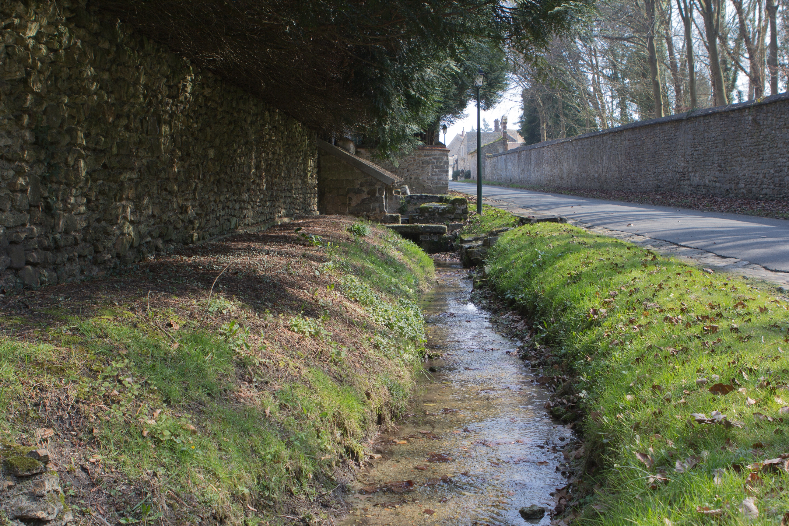 Lavoir du Rebai à Fleury-en-Bière (Fleury-en-Bière / Seine-et-Marne / France)